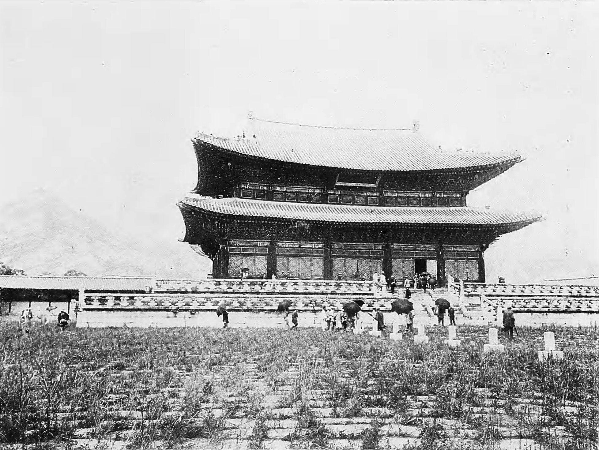 Gyeongbokgung, 1906